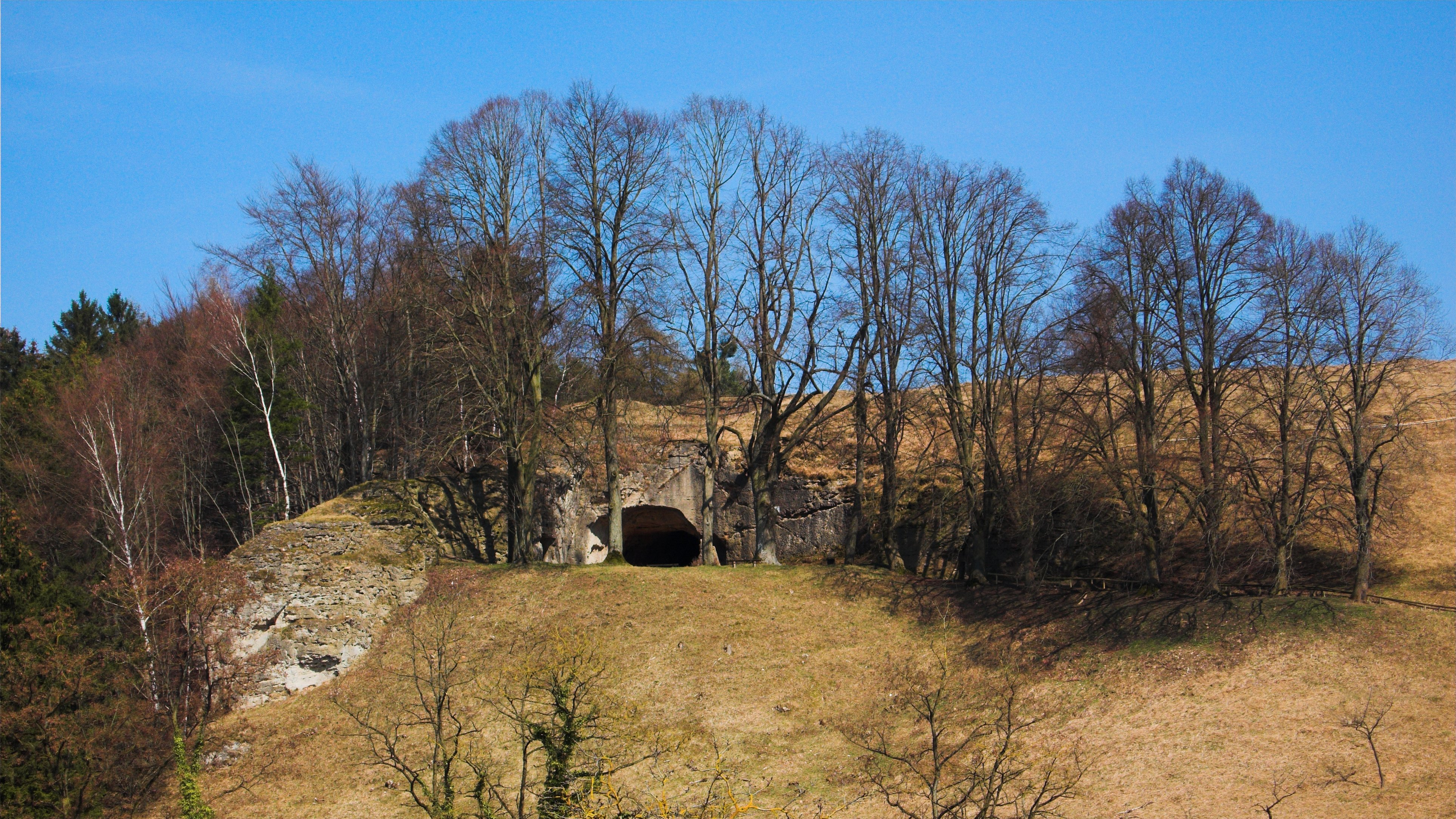 Blick vom gegenüberliegenden Schweinskopf zum Felsmassiv der Steinkirche bei Scharzfeld